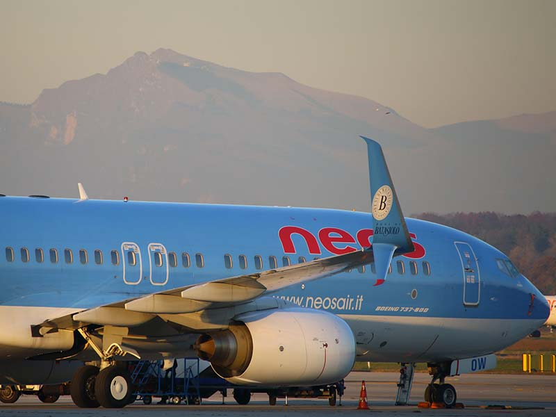 Split scimitar winglets